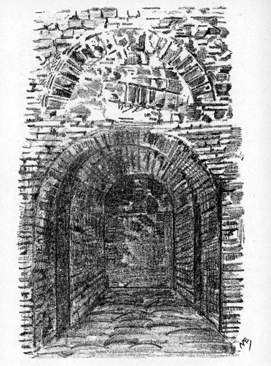 La poterne Aiguillère de la muraille gallo-romaine bouchée, situation des années 1870.